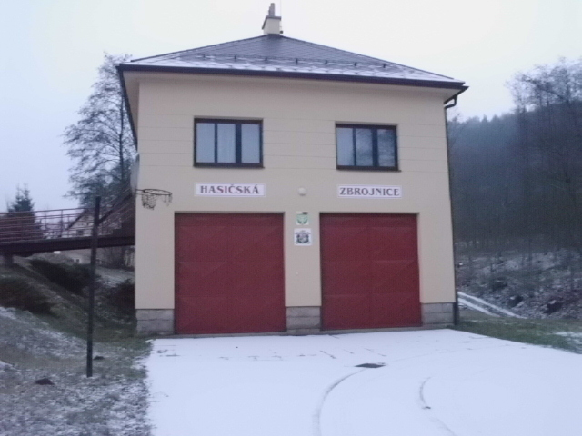 Úbislavice (okres Jíčín), požární zbrojnice